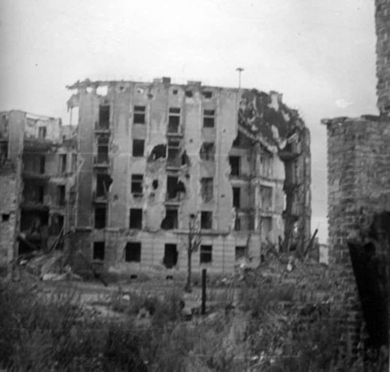 Pozostałości domu mieszkalnego pracowników Banku Polskiego u zbiegu ul. Okrąg i Wilanowskiej, z ruin naprzeciwległego domu przy Czerniakowskiej. Budynek zniszczony przy pomocy Goliatów.